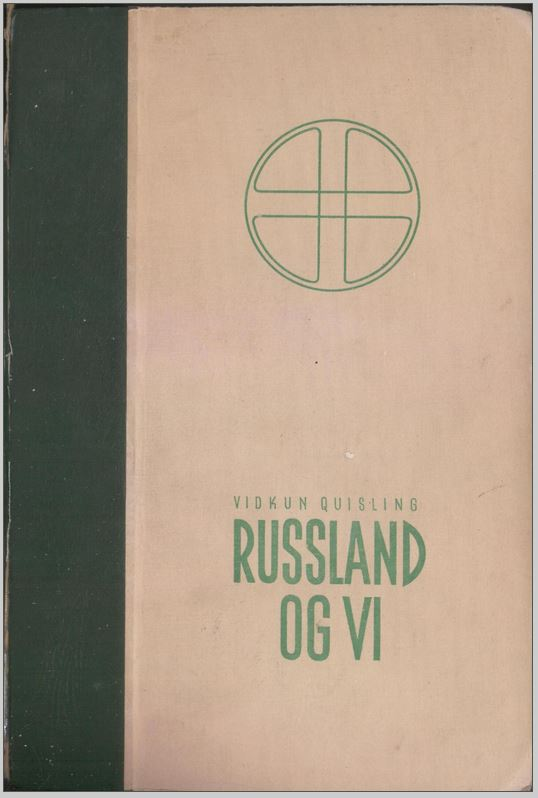 Russland og vi, nyutgivelse fra 1941.